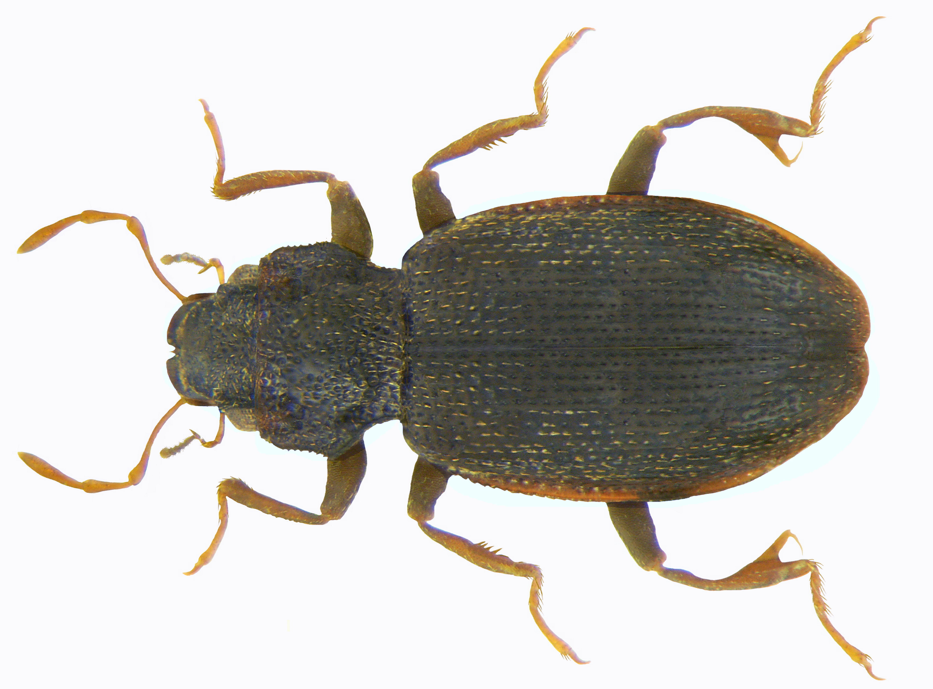 Familie: Hydraenidae Groesse: 2,8-2,9 mm Fundort: Nepal, Annapurna Region Ulleri Ghorepani, 2100-2800 m leg. A.Skale, 2000; det. Skale & Jäch, 2008 Paratype Photo: U.Schmidt, 2009